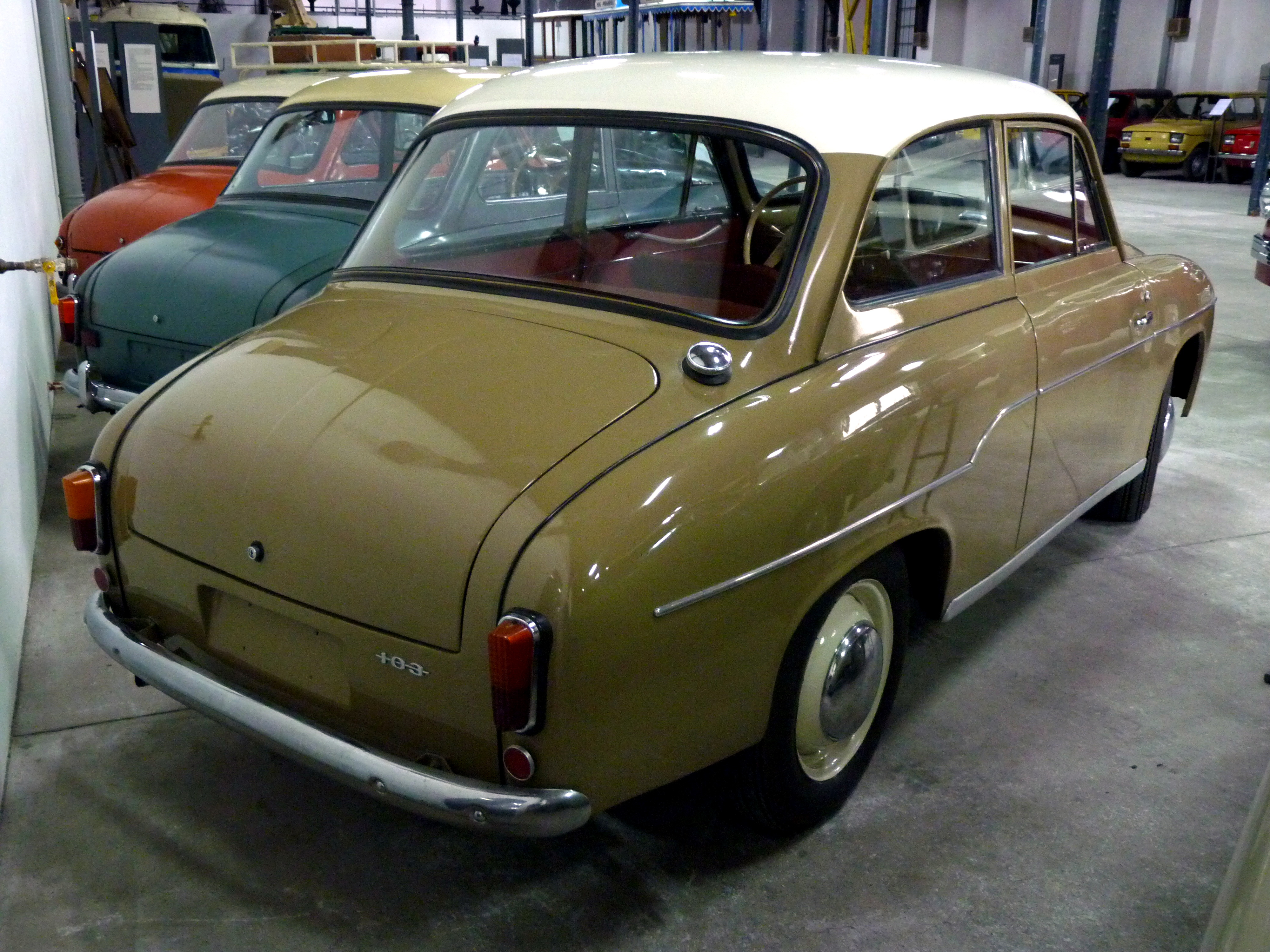 FSO Syrena 103 in Muzeum Inżynierii Miejskiej in Kraków.